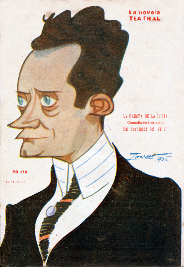 Caricatura de Elías Alippi.